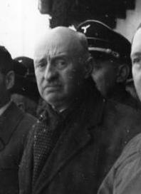 Eröffnung der IV. Winterolympiade. Der Führer, Baillet-Latour, Rudolf Hess